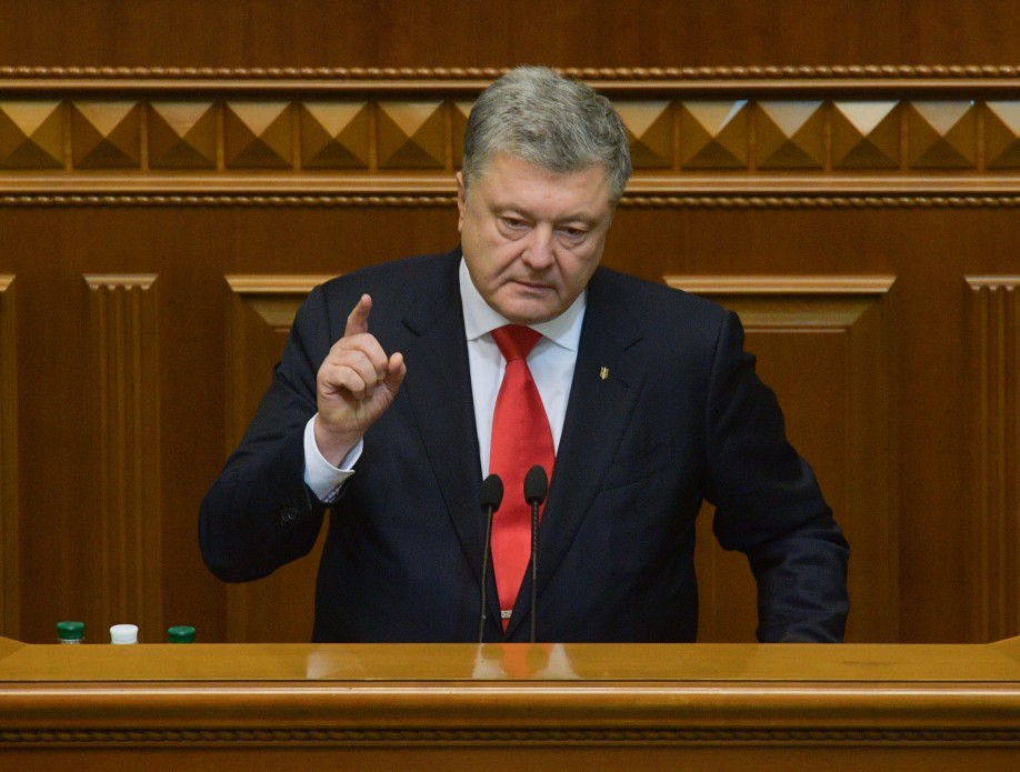 Президент Петр Порошенко во время выступления в Верховной Раде